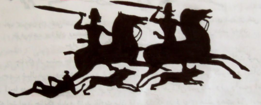 کیمریان (فراریان)، تصویری بر تابوتی از تمدن کلازومن. اواسط قرن ششم پ. م.